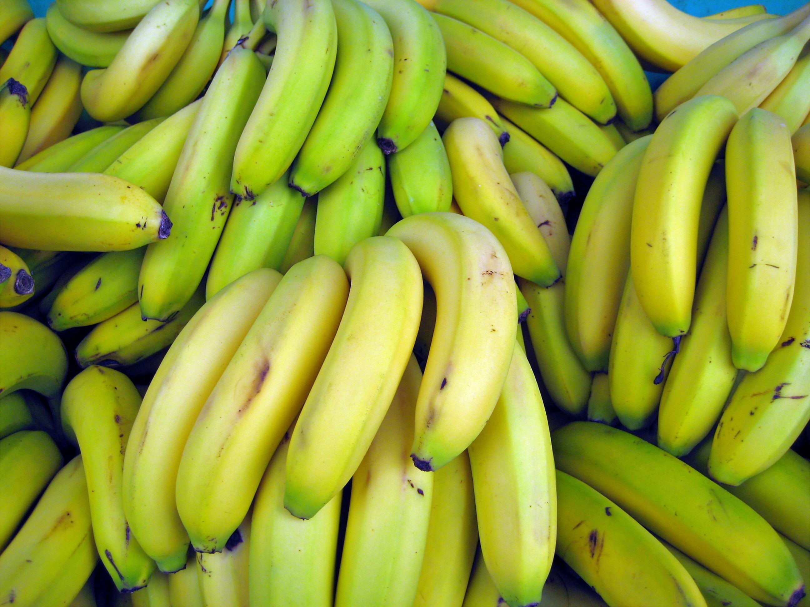 Bananas